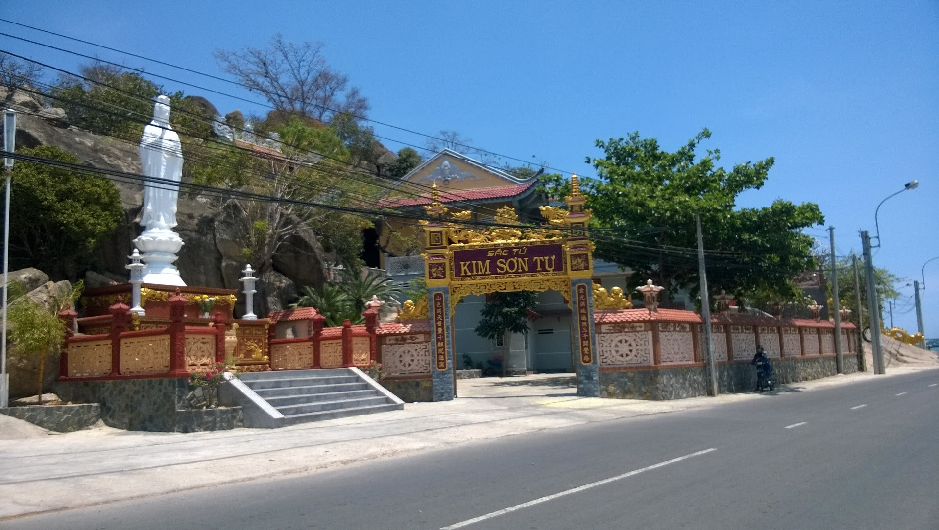 Kim Sơn tự, Tri Hải, Ninh Hải, Ninh Thuận